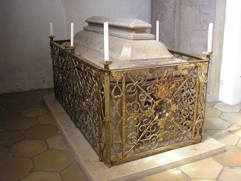 Dom zu Eichstätt (Oberbayern). Sakramentskapelle. Grabtumba Bischof Gundekars II. (1057-75). Eigene Aufnahme, April 2007 / Eichstaett cathedral (Upper Bavaria, Germany). Sacrament chapel. Tomb of Bishop Gundekar II. (1057-75). Own photo, April 2007